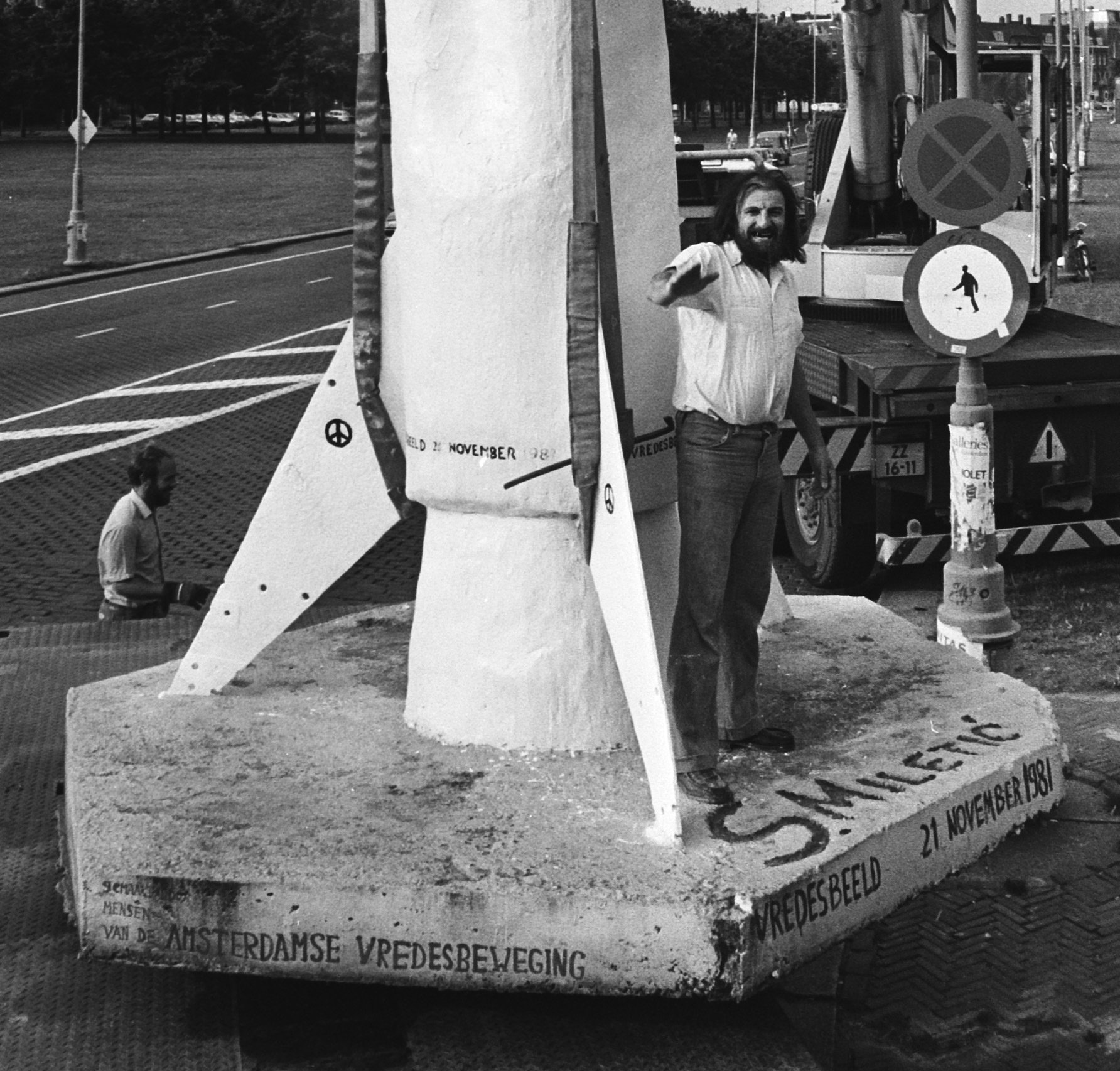 Collectie / Archief : Fotocollectie Anefo Reportage / Serie : Vredesmonument van Slavomir Miletic wordt naar zijn standplaats op het Museumplein te Amsterdam vervoerd Beschrijving : hijskranen, Miletic, Slavomir Annotatie : Naam Vredesbeeld, ook wel Vredesraket. In 1995 door stadsdeel Zuid verwijderd. Verblijfplaats onbekend Datum : 26 augustus 1983 Locatie : Amsterdam, Noord-Holland Trefwoorden : beeldhouwers, beeldhouwwerken, hijskranen Persoonsnaam : Miletic, Slavomir Fotograaf : Croes, Rob C. / Anefo Auteursrechthebbende : Nationaal Archief Materiaalsoort : Negatief (zwart/wit) Nummer archiefinventaris : bekijk toegang 2.24.01.05 Bestanddeelnummer : 932-6756